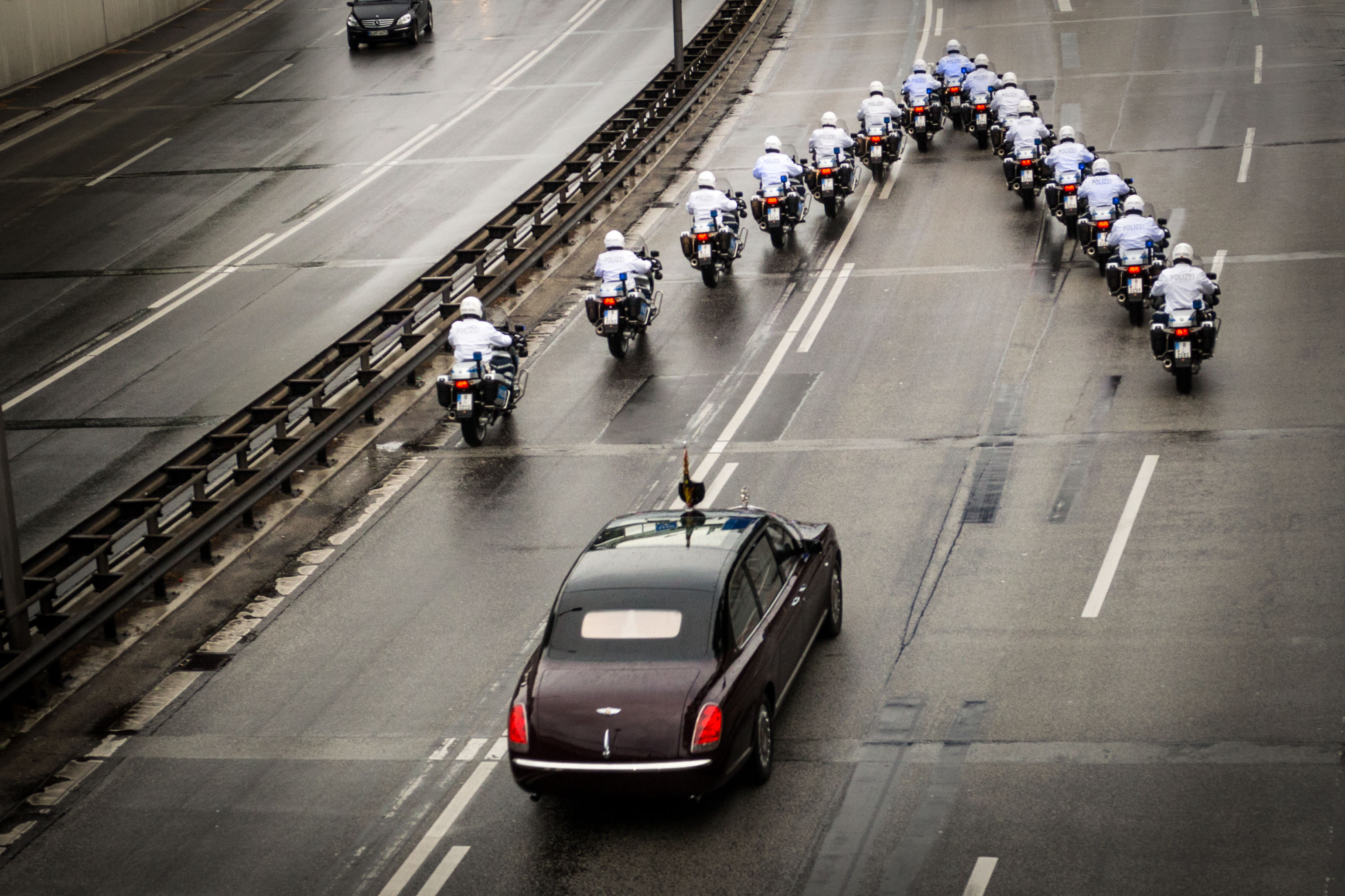 Queen in Berlin 2015